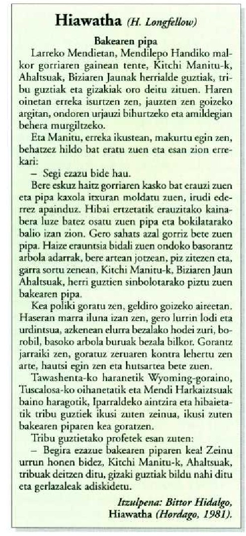 Hiawathako kantua, B. Hidalgok euskaratua